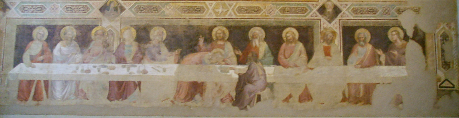 Cenacolo (Last Supper) di Santa Croce by Taddeo Gaddi, in Florence, Italy